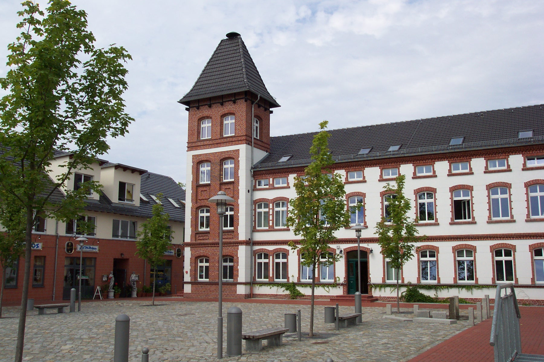 Rathaus Woltersdorf